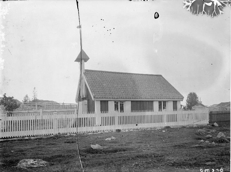 Exteriör Kategori: (01) ExteriörerExteriör.